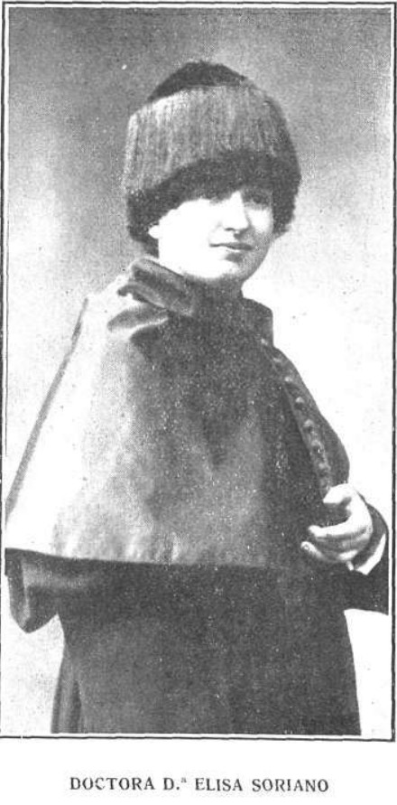 Retrato fotográfico de la Doctora en Oftalmología D.ª Elisa Soriano Fischer. Defensora de los derechos y capacidades de las mujeres en España.